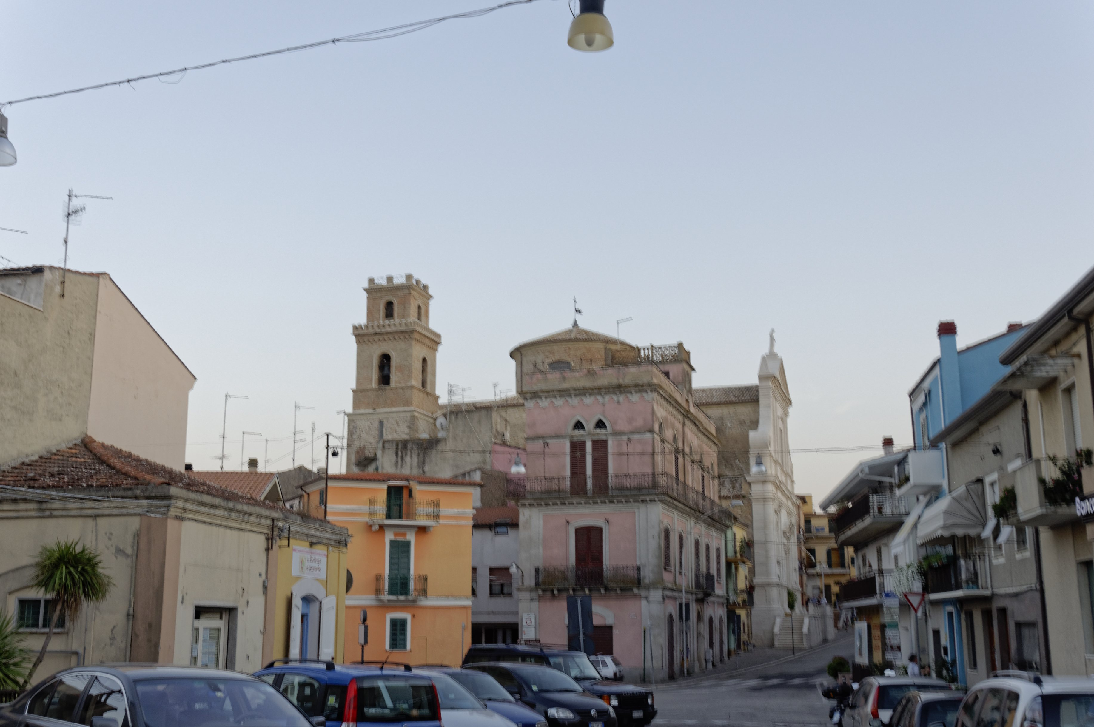 San Vito Chietino 2015 Dieses Foto entstand in Zusammenarbeit mit Stadtbesichtigungen.de Die Seiten Stadtbesichtigungen.de, der dazugehörige Reise Blog sowie die Facebookseite: Stadtbesichtigungen Rom dürfen dieses Bild für Ihre Veröffentlichungen ohne den Hinweis auf Wikipedia, Commons bzw der Lizenz verwenden. Die Verantwortlichen habe von mir (Ra Boe) die Originaldaten zur freien Verfügung übermittelt bekommen.